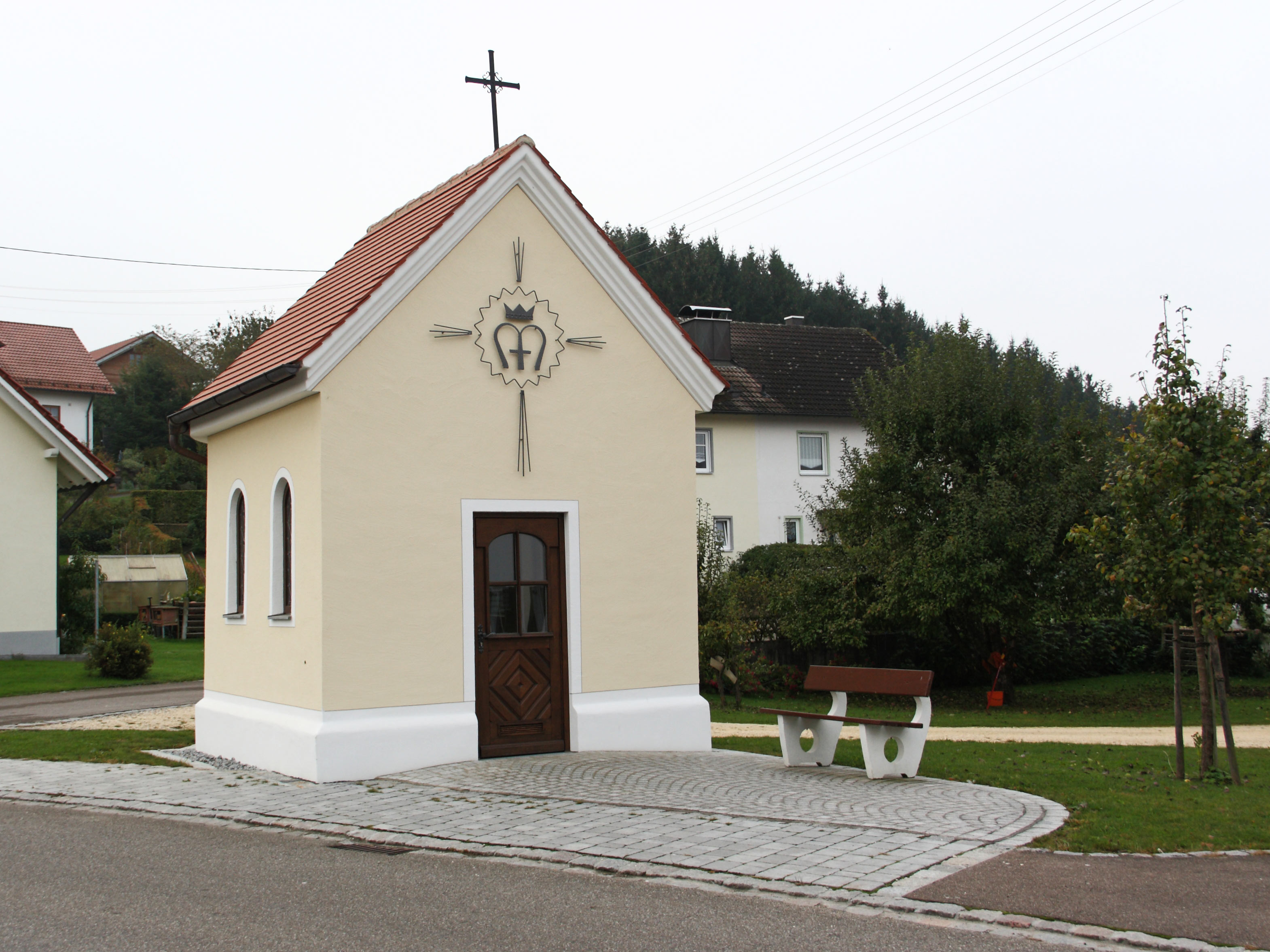 Kath. Votivkapelle in Nattenhausen, Gemeinde Breitenthal; Neubarockbau von etwa 1900, Nordostansicht